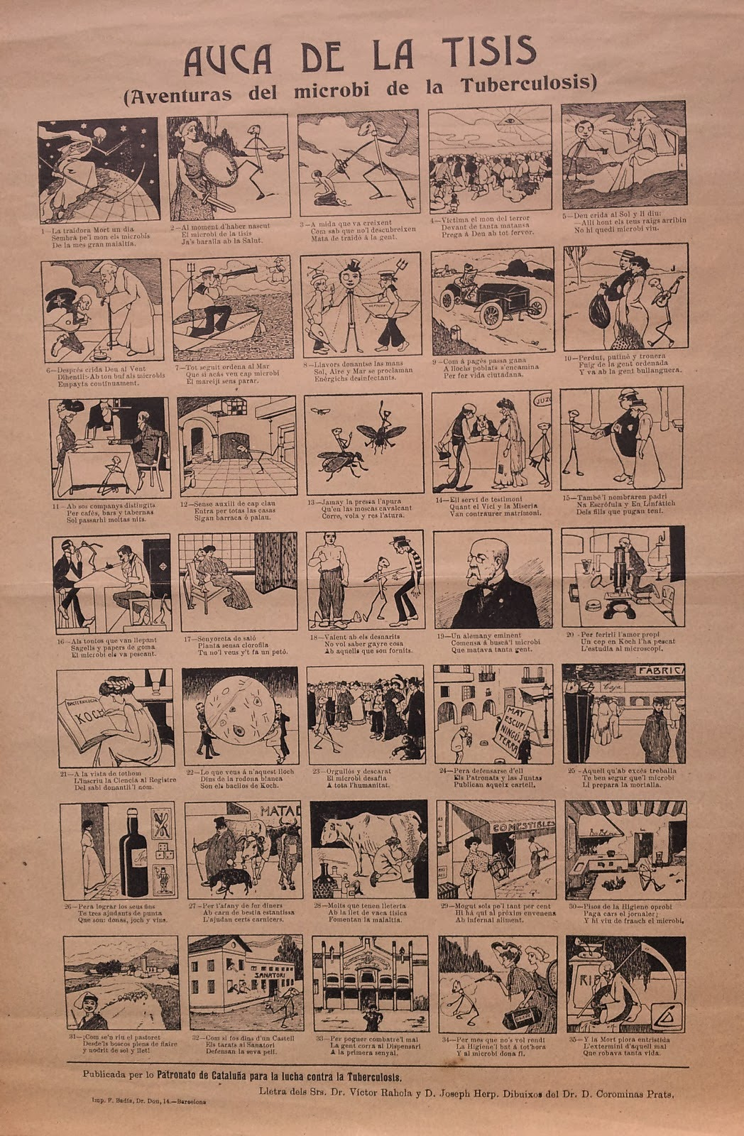 Auca de la tisis. Aventuras del microni de la Tuberculosis